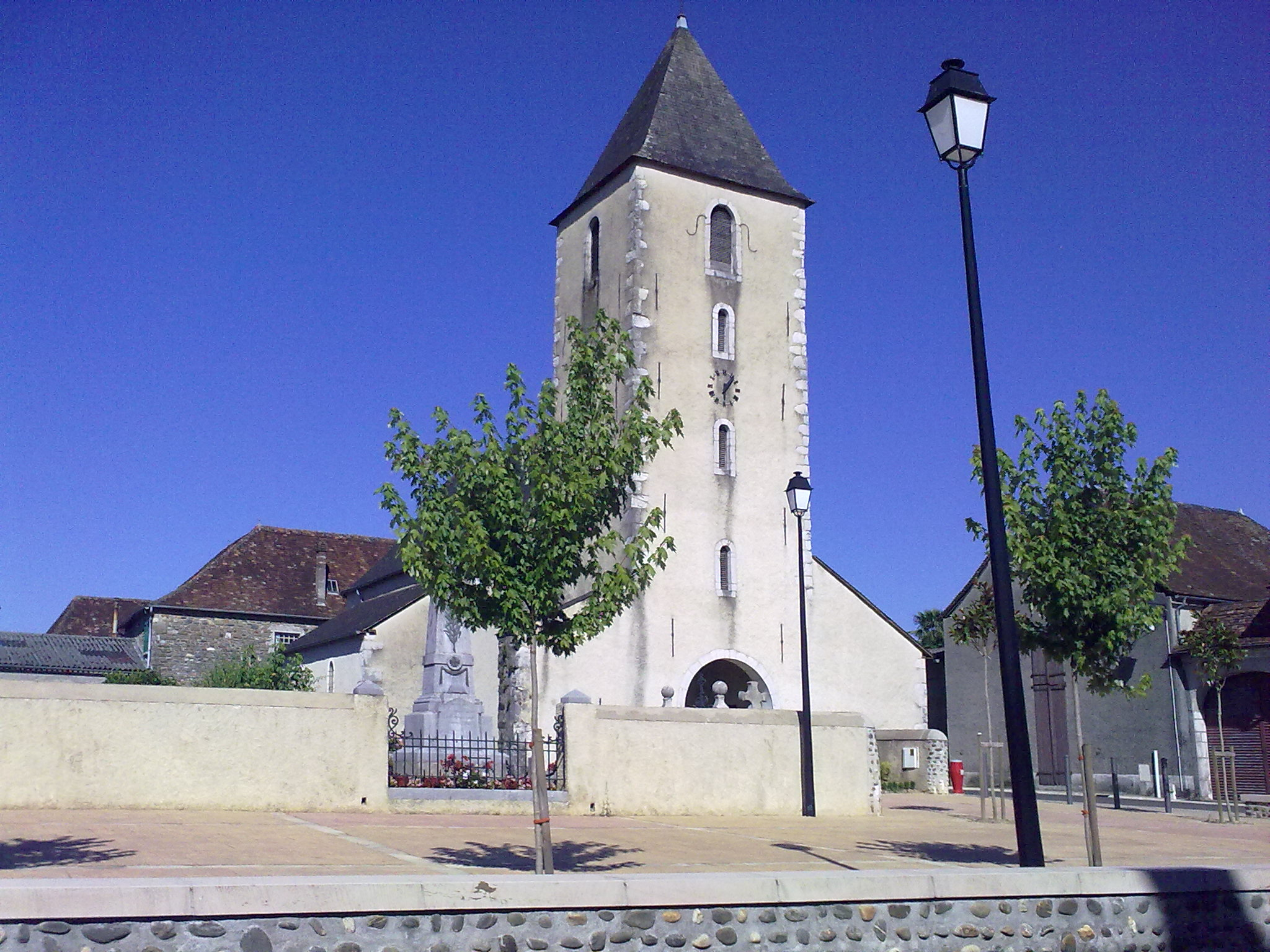 Méritein le 18 juillet 2010, France.